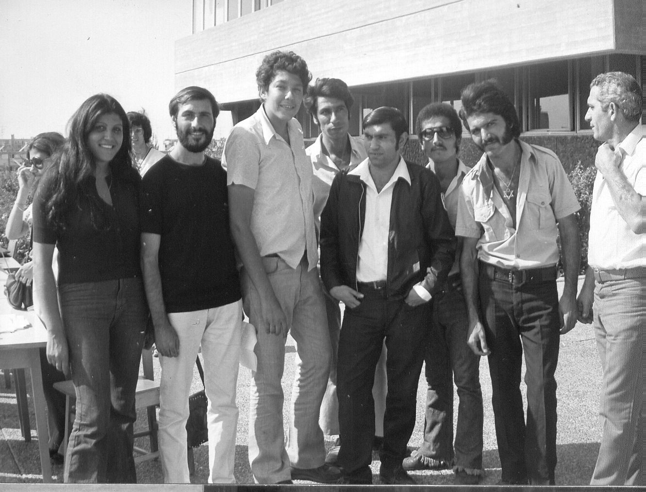 הפגנת הפנתרים השחורים באוניברסיטת תל אביב מס׳1. צילום דוד בן-נון. מימין לשמאל: יעקב אלבז, עמרם כהן, יצחק כהן, כוכבי שמש, פליקס זגרון, סמי גוהר, יגאל בן-נון, טובה גוהר